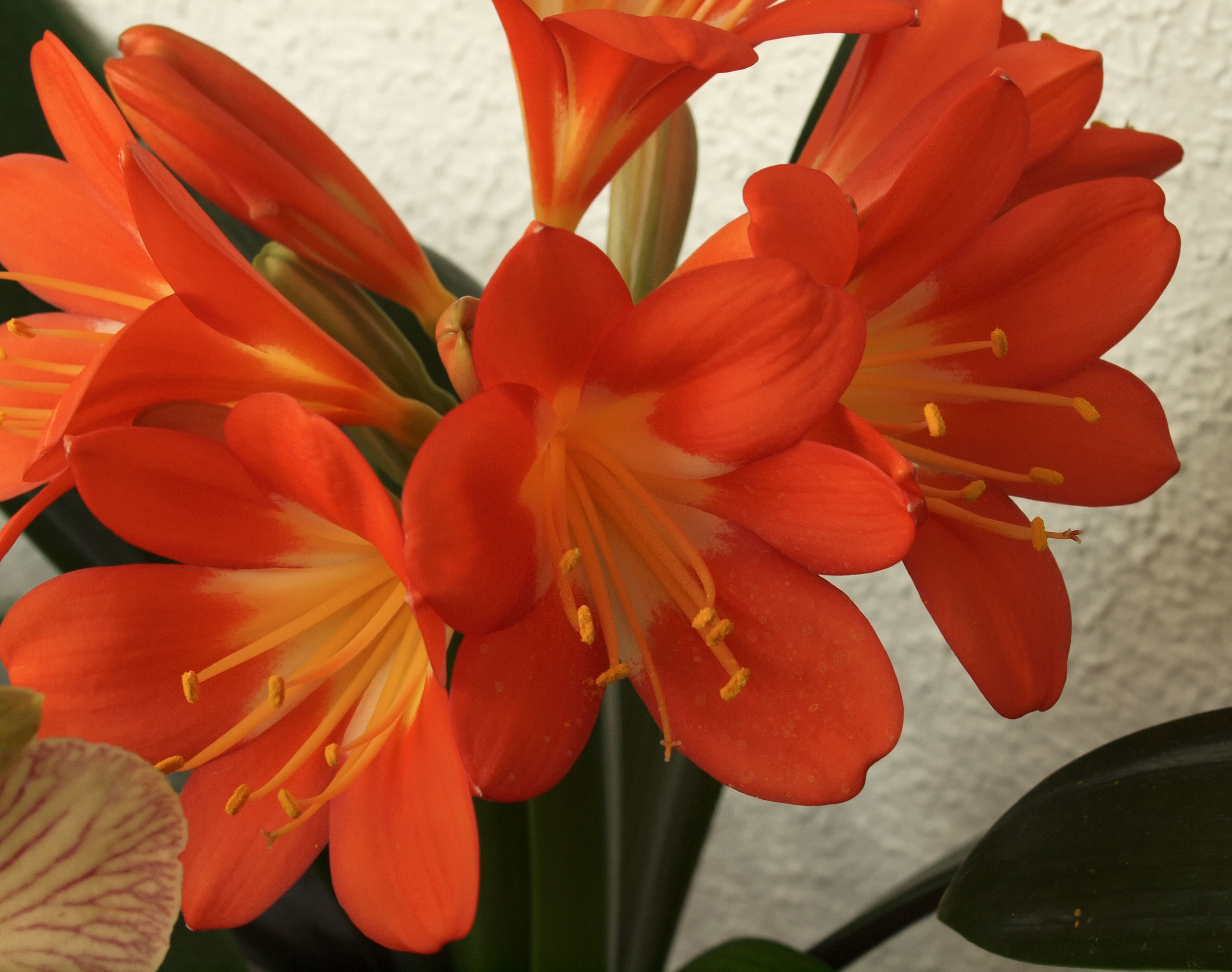 Clivia miniata